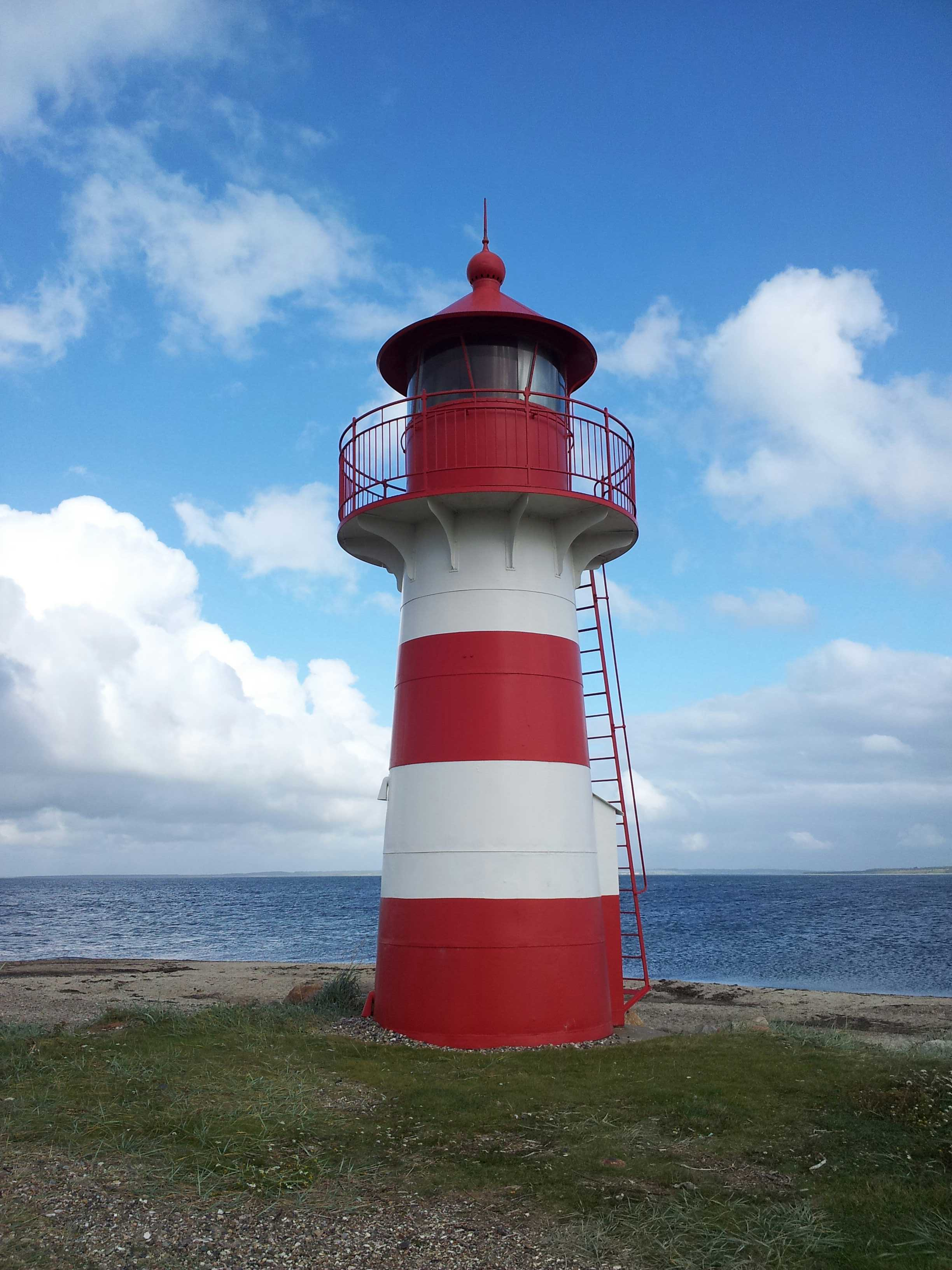 Grisetåodde Fyr This photo was uploaded with Wiki Loves Monuments mobile 1.2.1 (Android).